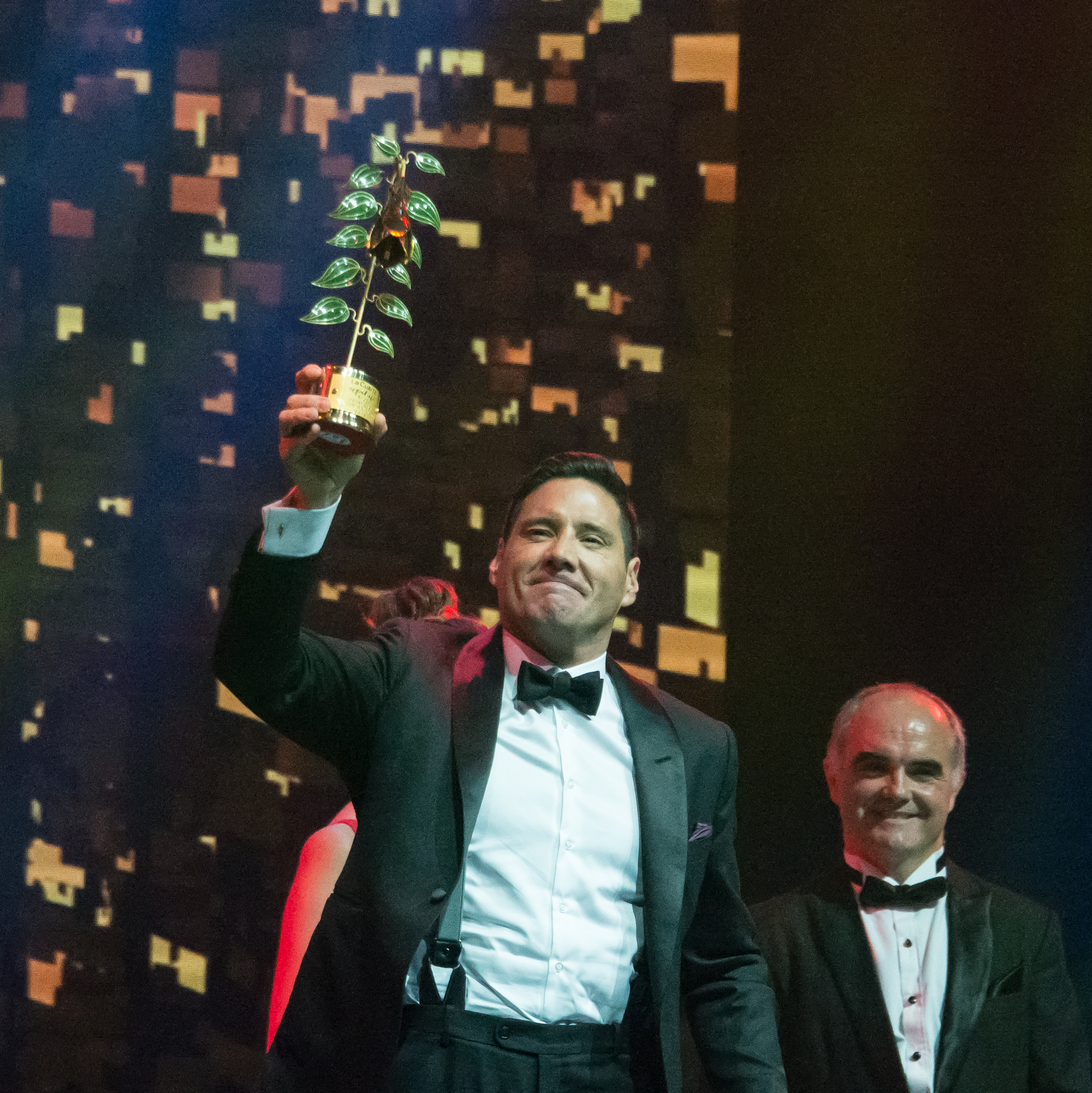 Francisco Saavedra, Copihue de Oro 2018, Sun Monticello, Mostazal, Región de O'Higgins, Chile